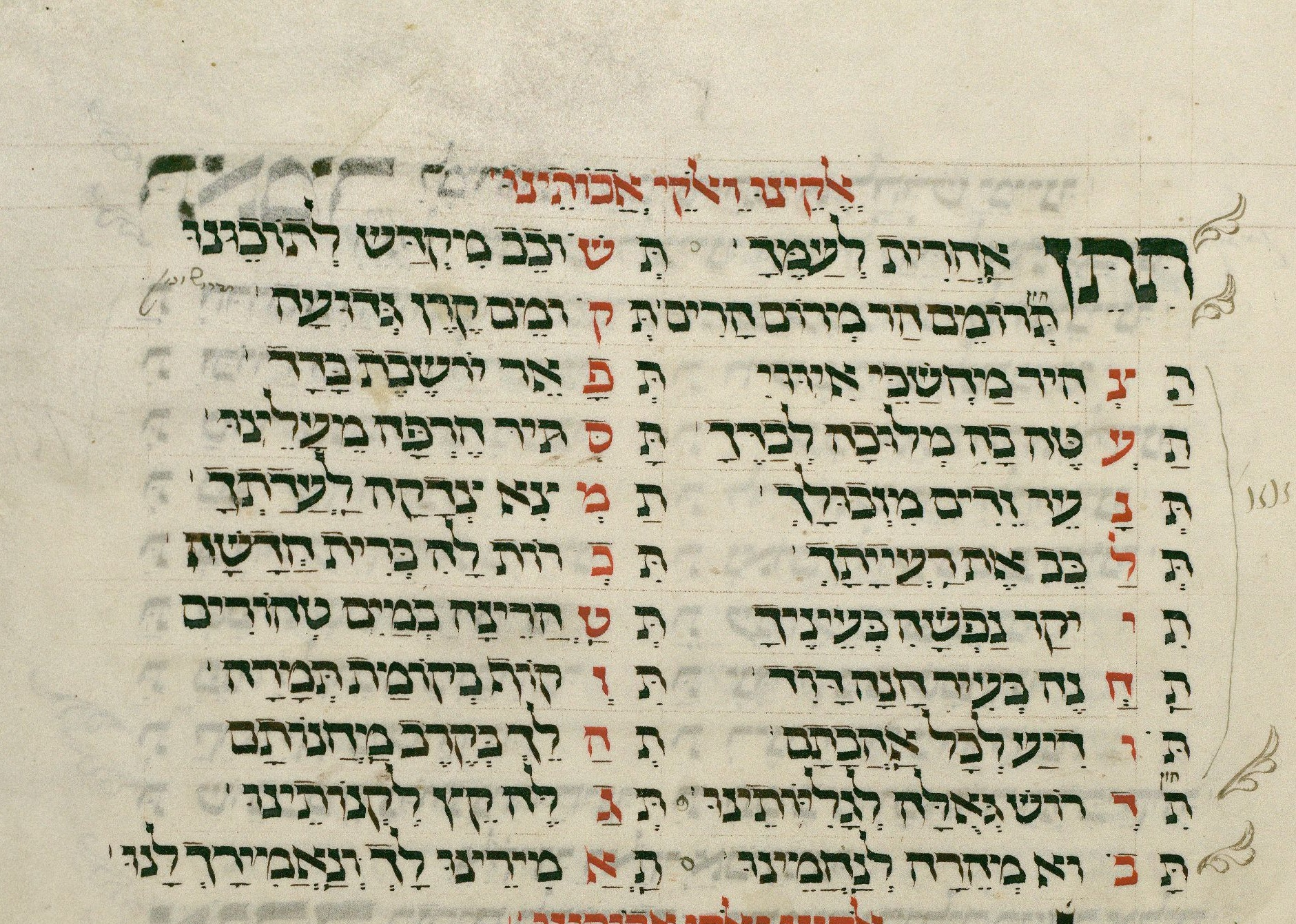 פיוט מתוך מחזו וורמייזא